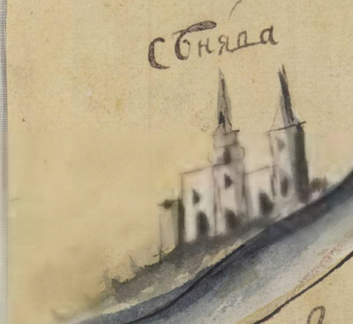 Фрагмент карти Київської губернії. XVIII століття. РГАДА, ф. 192, оп. 1, Киевская губ., № 5.